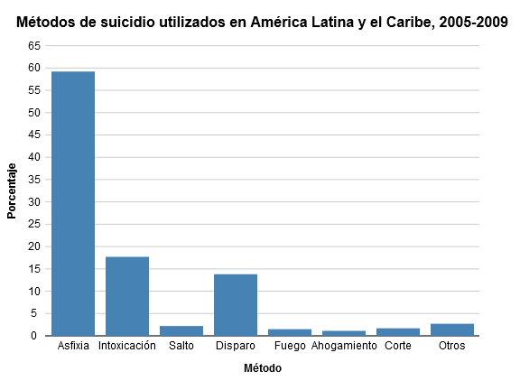 Métodos de suicidio utilizados en América Latina y el Caribe entre 2005 y 2009, según OPS, 2014.